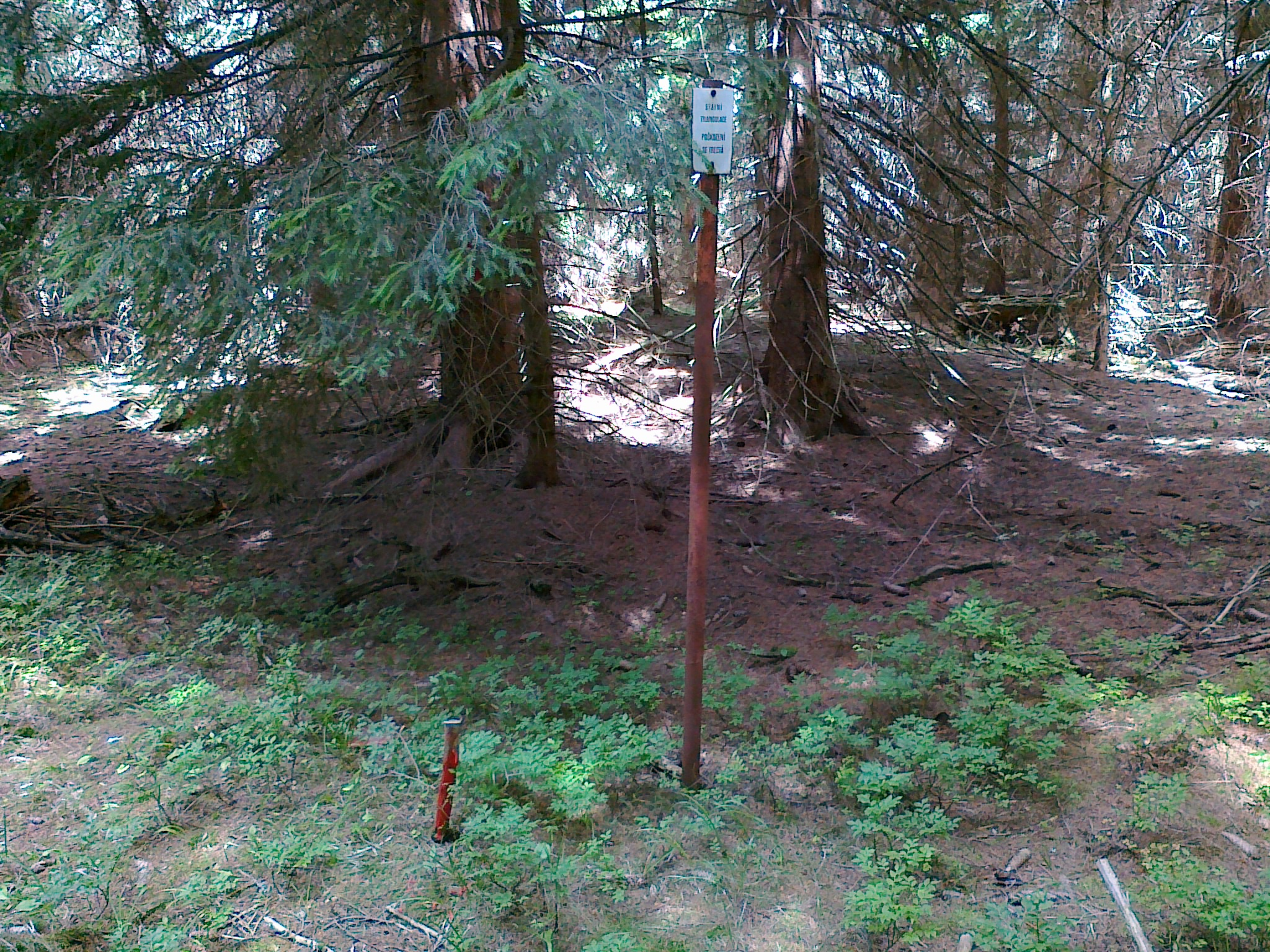 Punkt geodezyjny na górze Soukenná - 1026 m n.p.m.